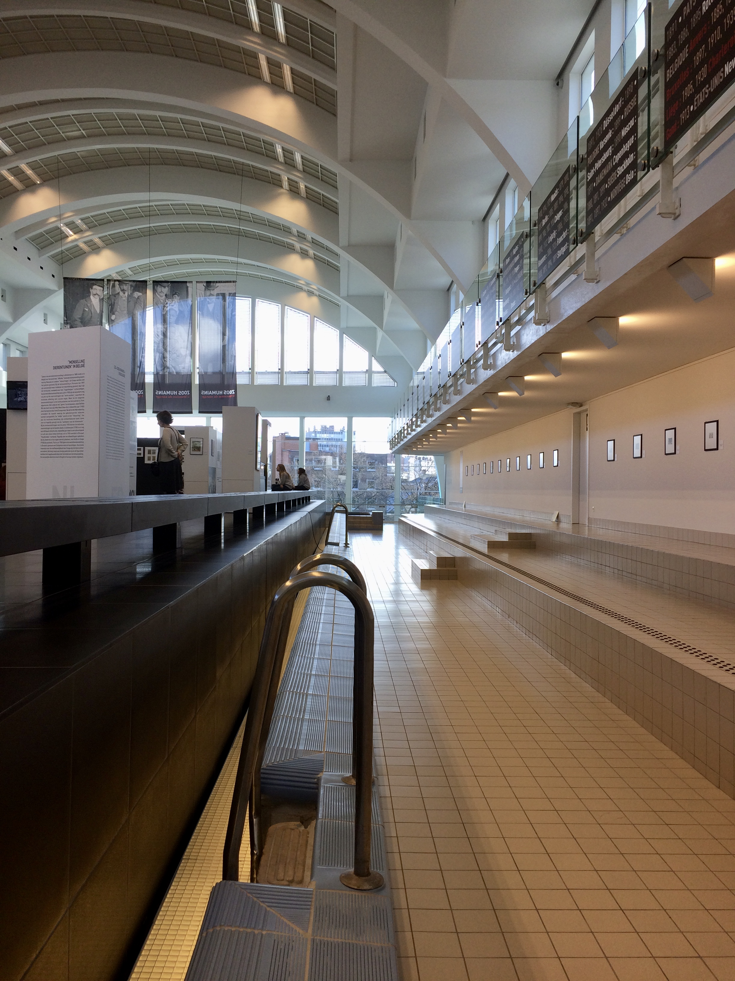 Exposition 2017: "ZOOS HUMAINS : L'INVENTION DU SAUVAGE' à la Cité Miroir